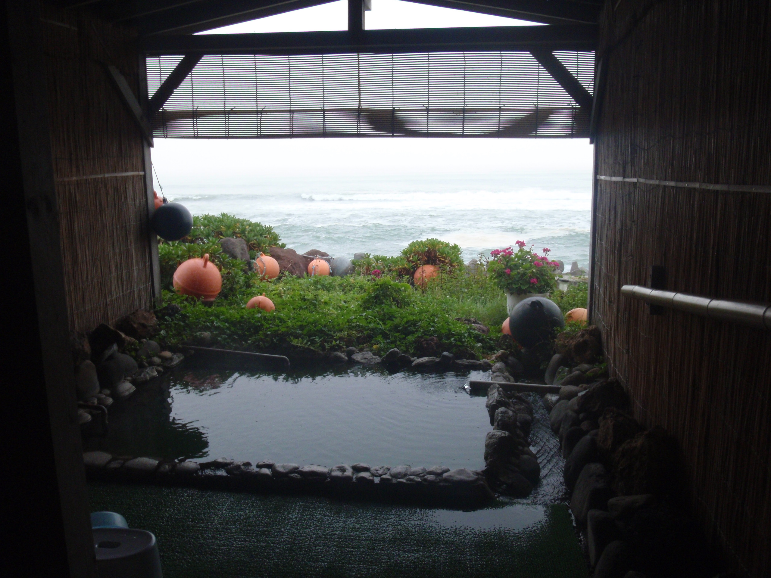 虎杖浜温泉民宿500マイルの太平洋を望む半露天風呂